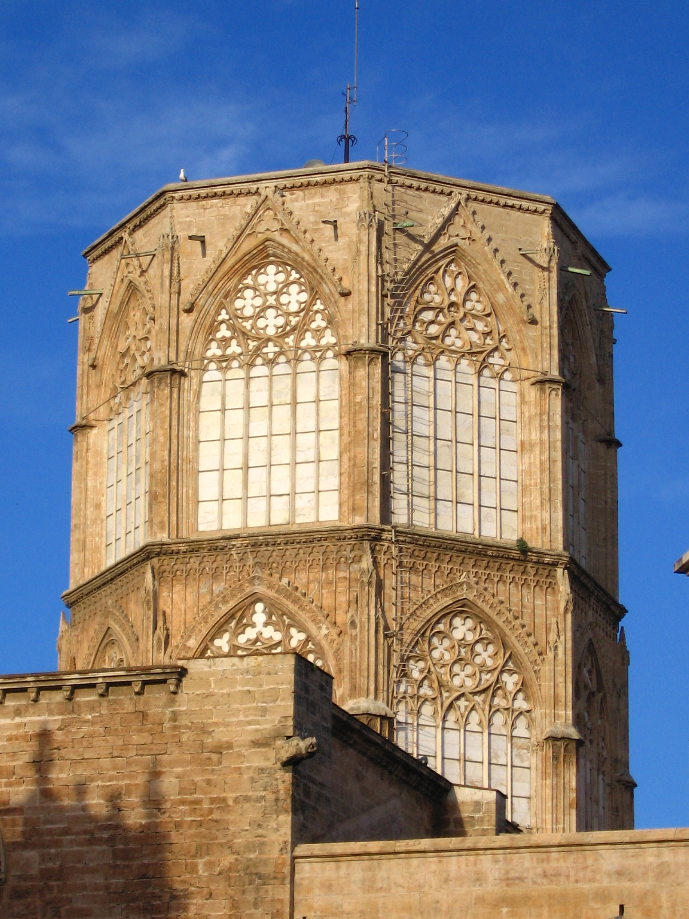 Cimborri de la Seu (València)